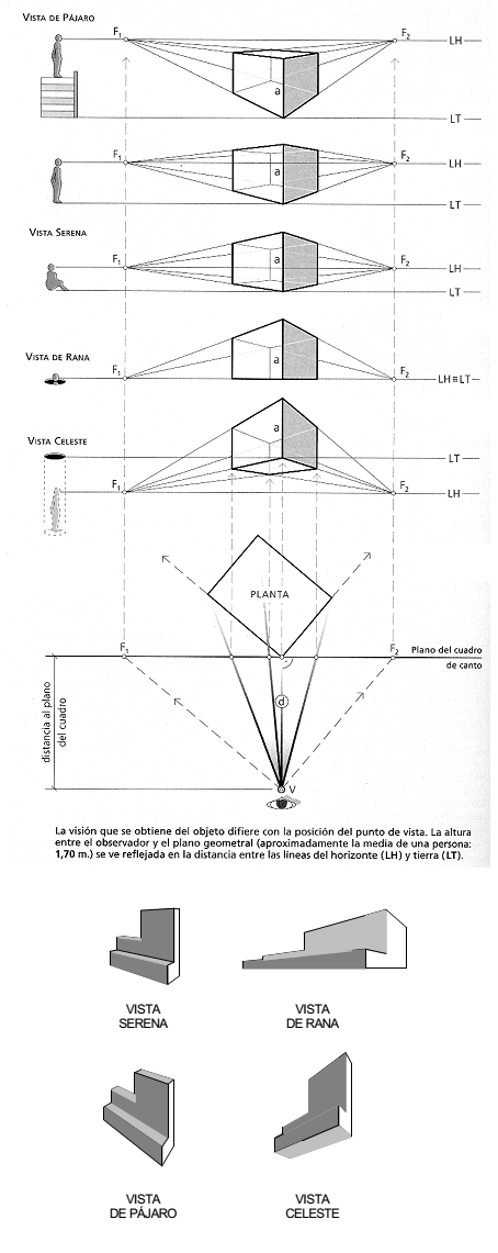 perspective